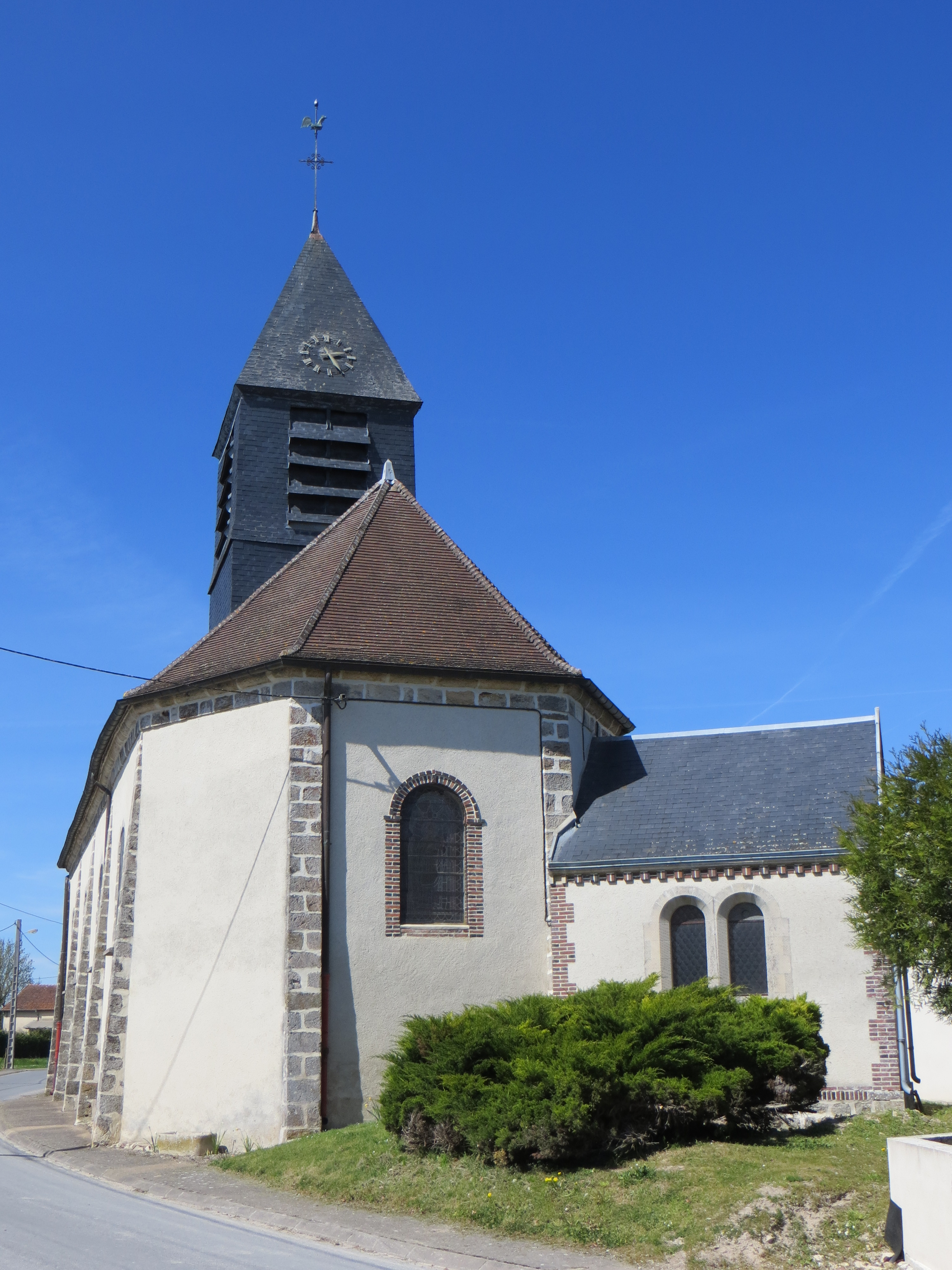 Vue du chevet de l'église